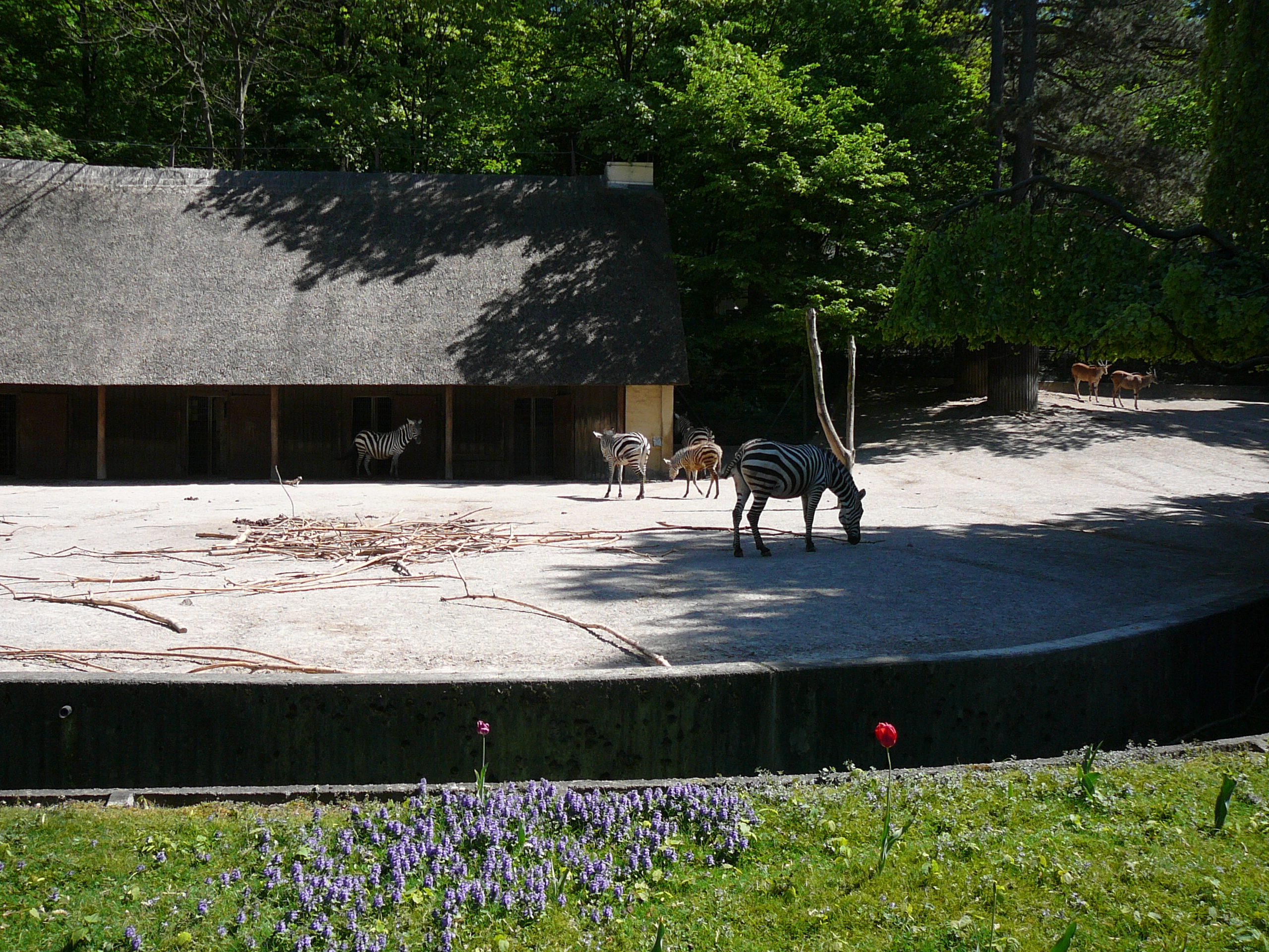 Equus quagga boehmi